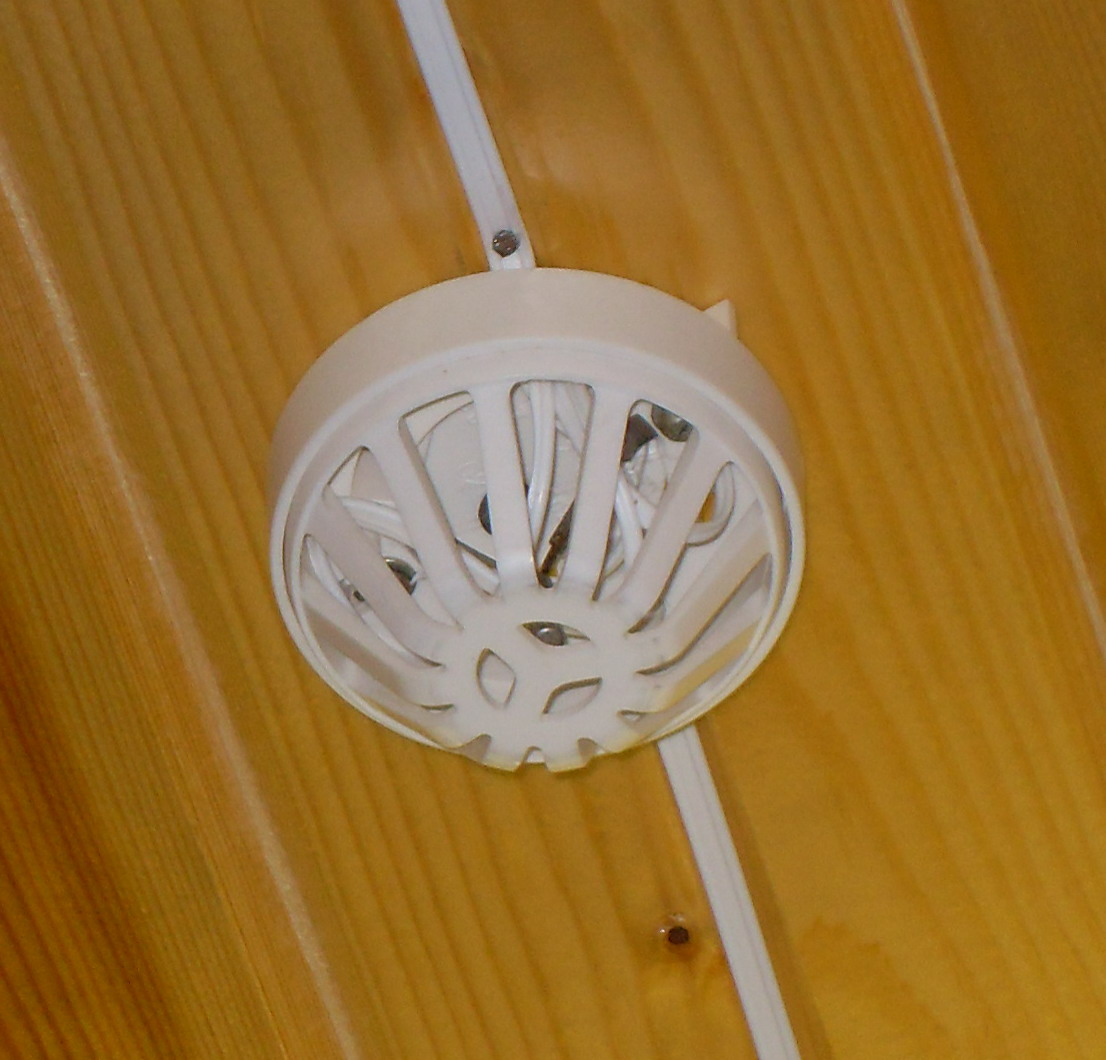 Точечный тепловой пожарный извещатель